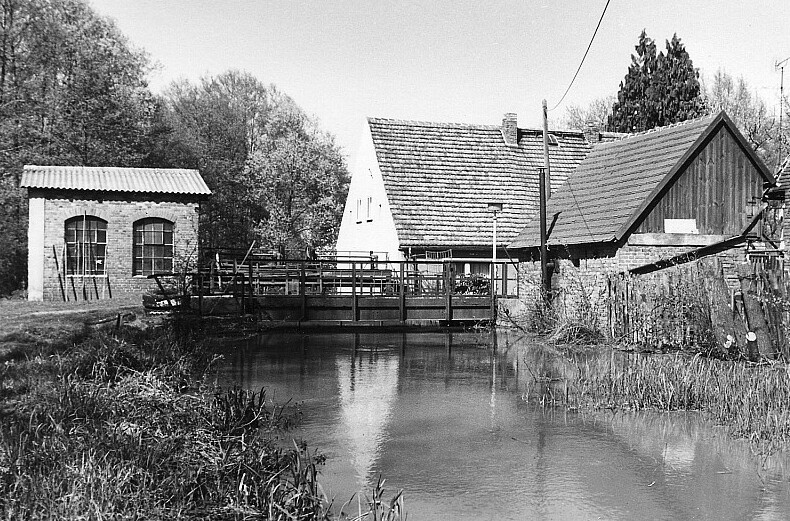 Original image description from the Deutsche Fotothek Spreetal-Burgneudorf. Ehem. Mühle, jetzt Sägemühle